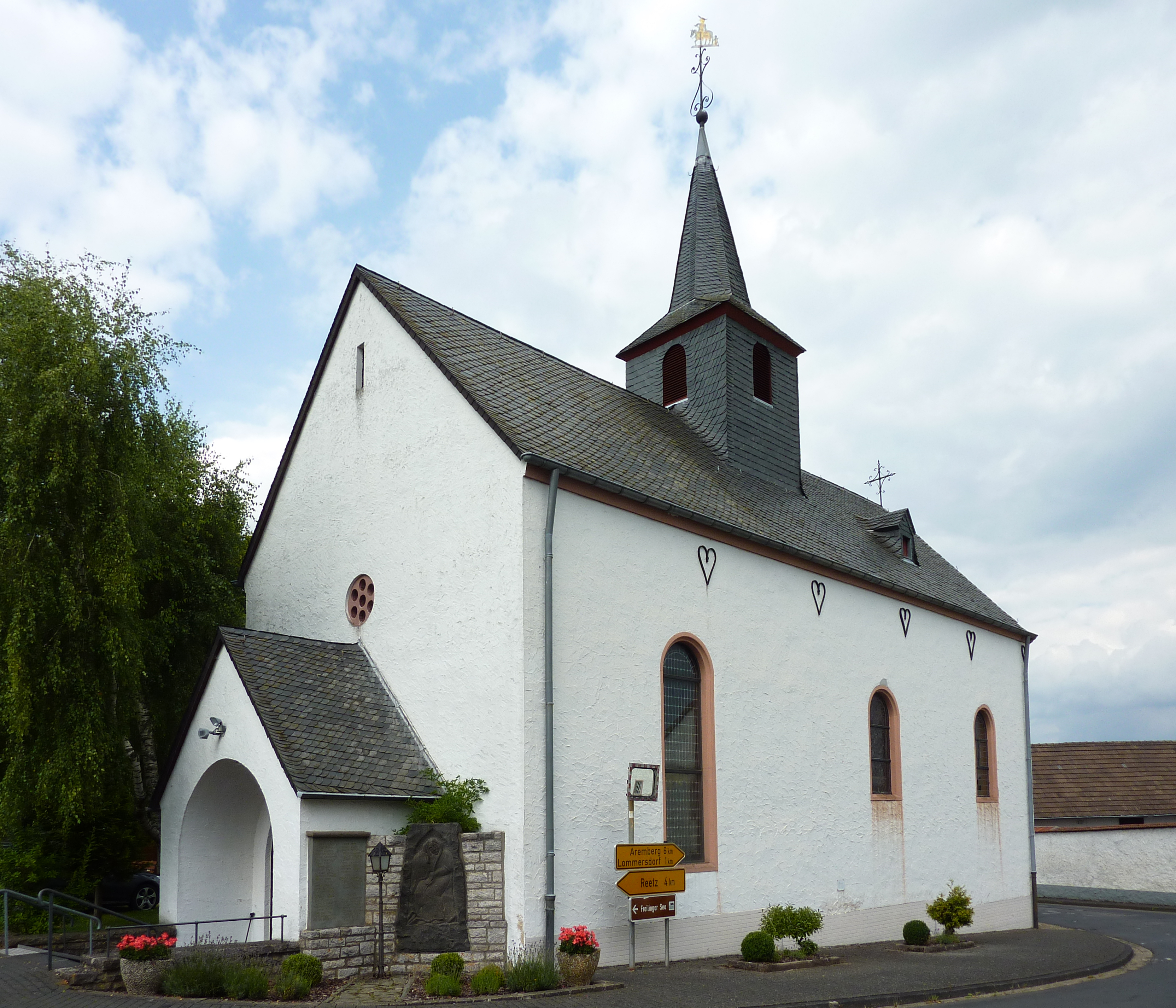 Freilingen, Marienplatz 1, kath. Kapelle St. Martin, von SW